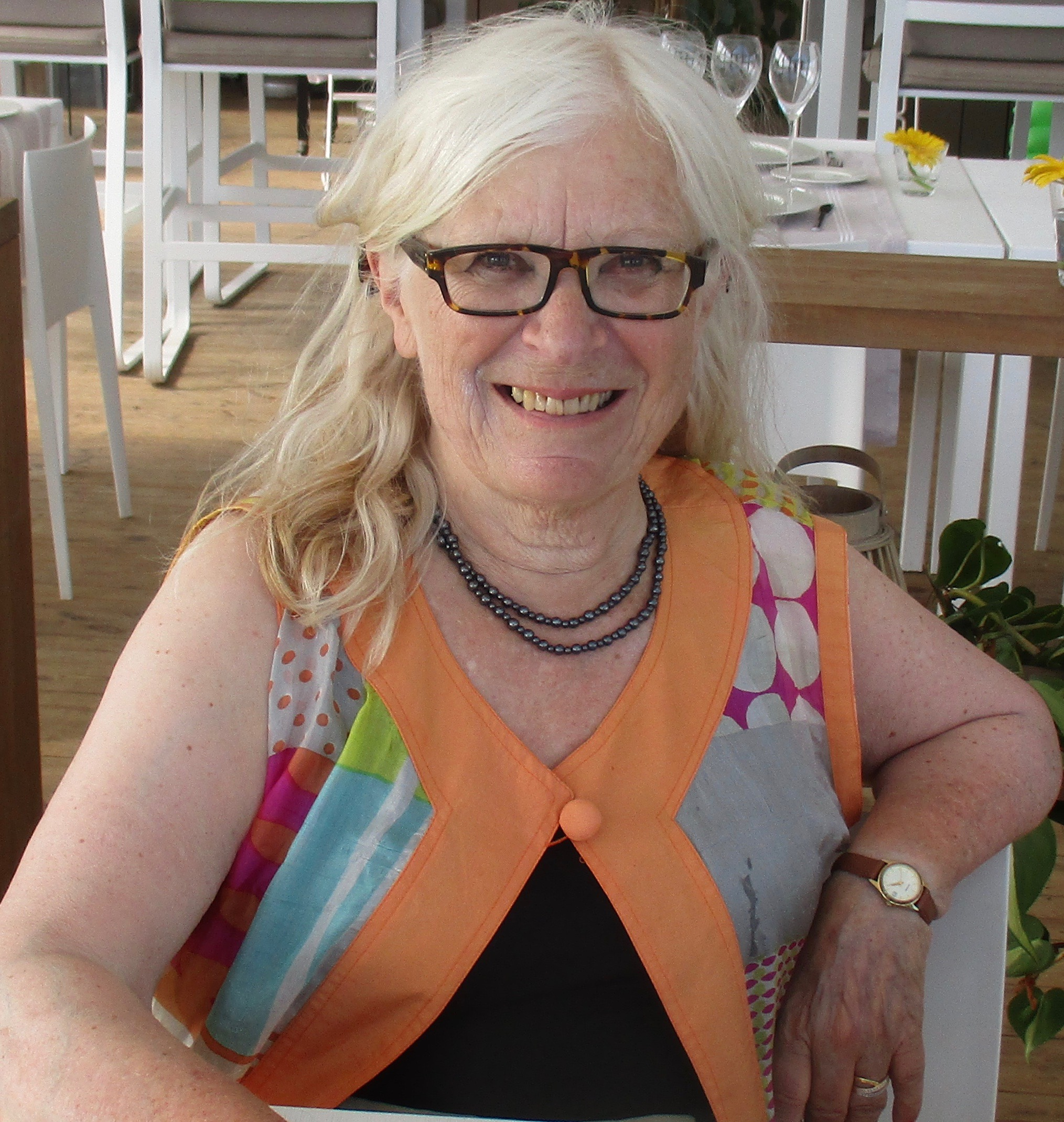 Eivor i Spanien